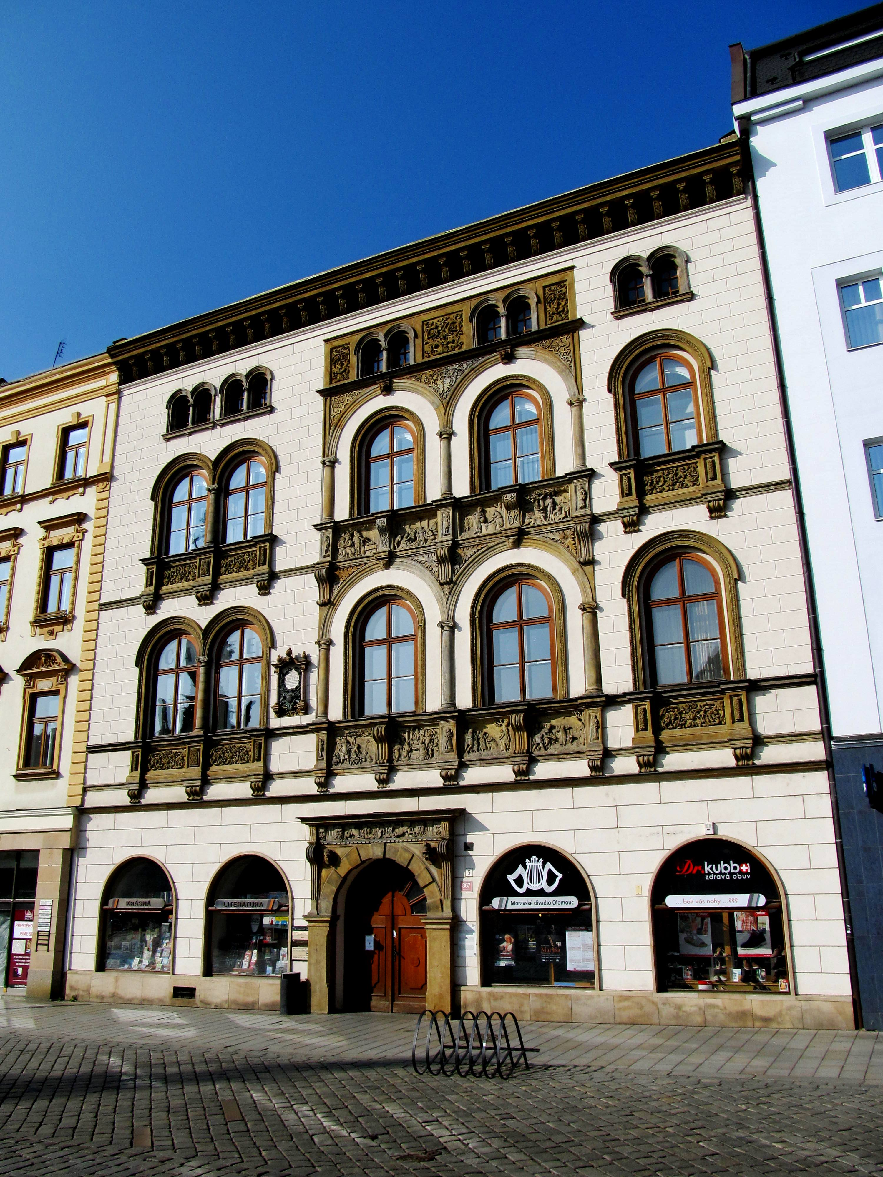 Olomouc, Edelmannův palác, Horní náměstí 367/5